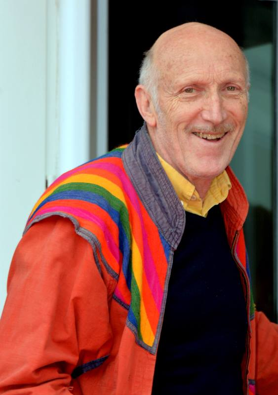 Rufus au festival de Cabourg